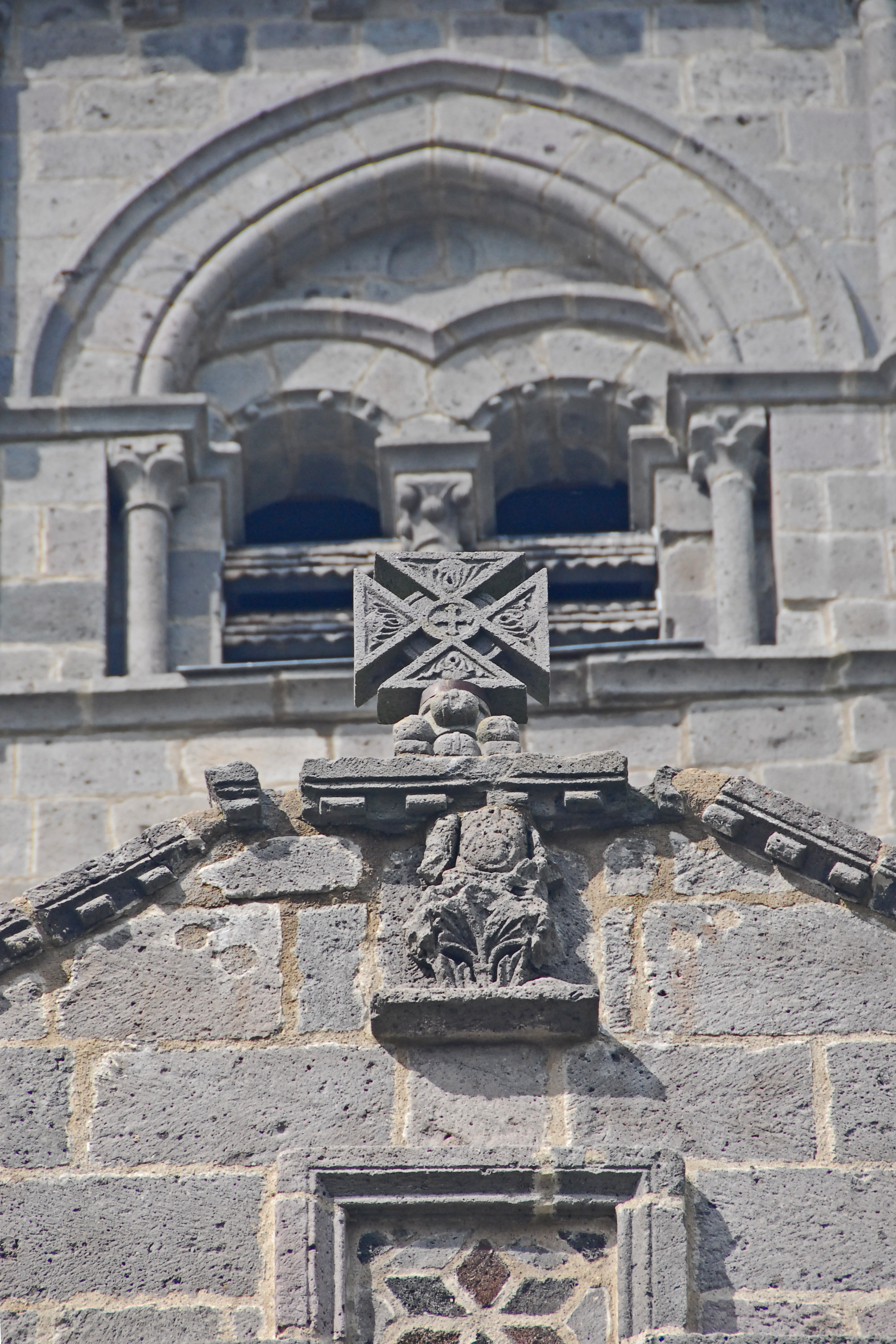 N.-D.d'Orcival, südl. Querhausarm, Giebelfirst